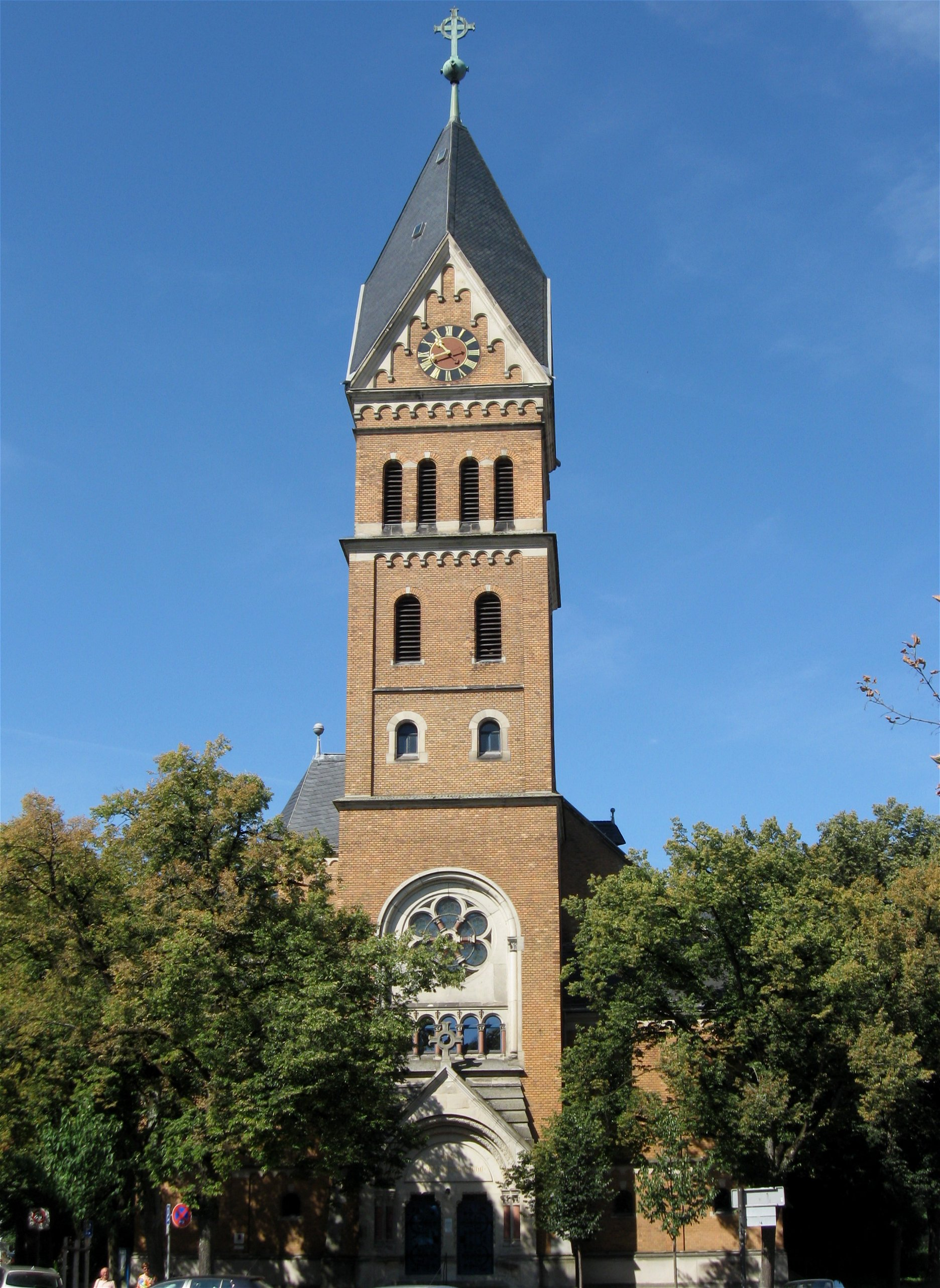 Martin-Luther-Platz 1; Evang.-Luth. Christuskirche, dreischiffiger neuromanischer Hallenbau, 1895-1897 nach Plänen von Karl Lemmes; mit Ausstattung. D-2-61-000-340